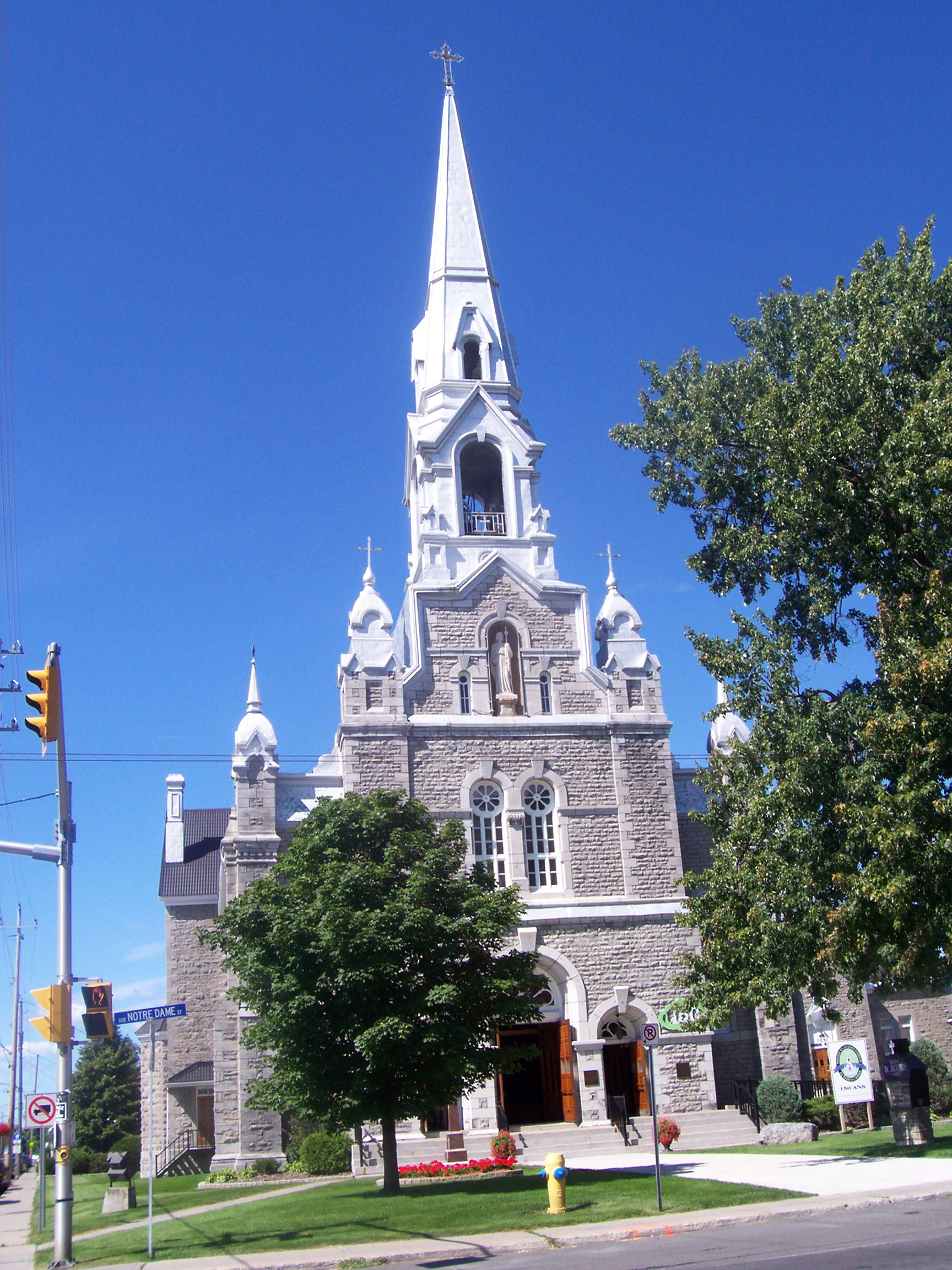 Taken in Embrun, Ontario.